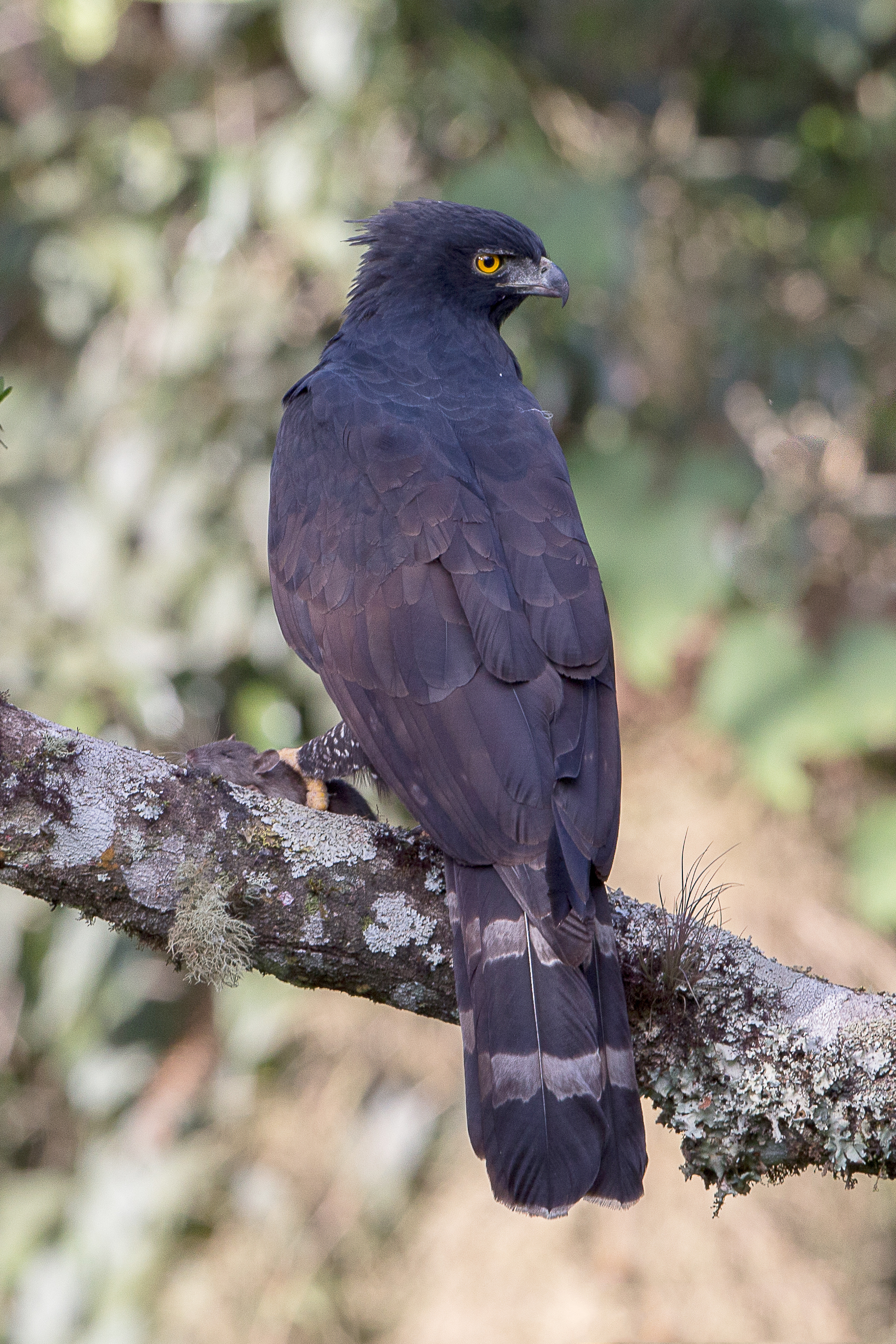 Gavião-pega-macaco (Spizaetus tyrannus)